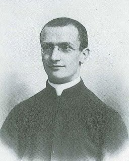 Alfredo Ottaviani da seminarista (1916 circa)